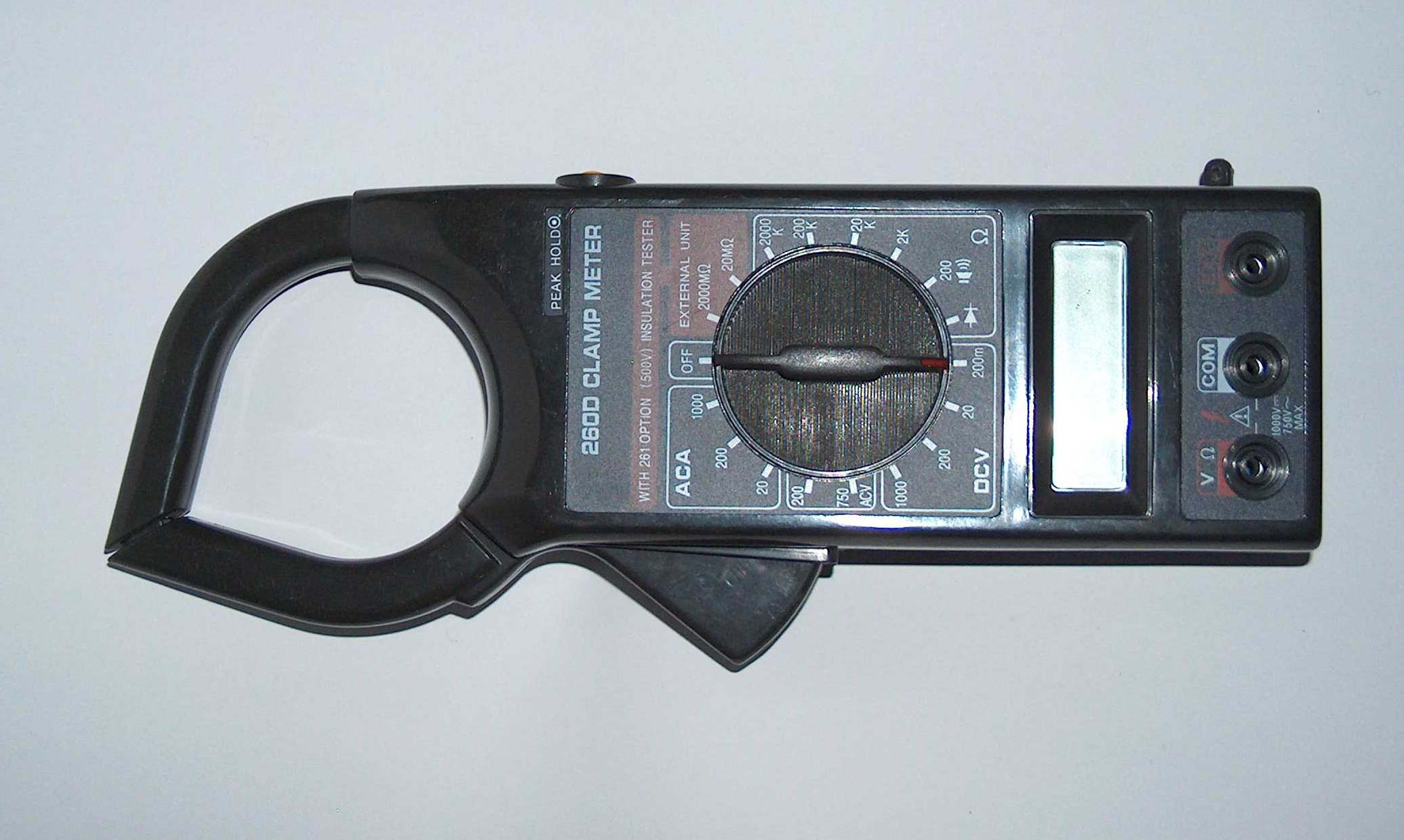 Clampmeter AC currents